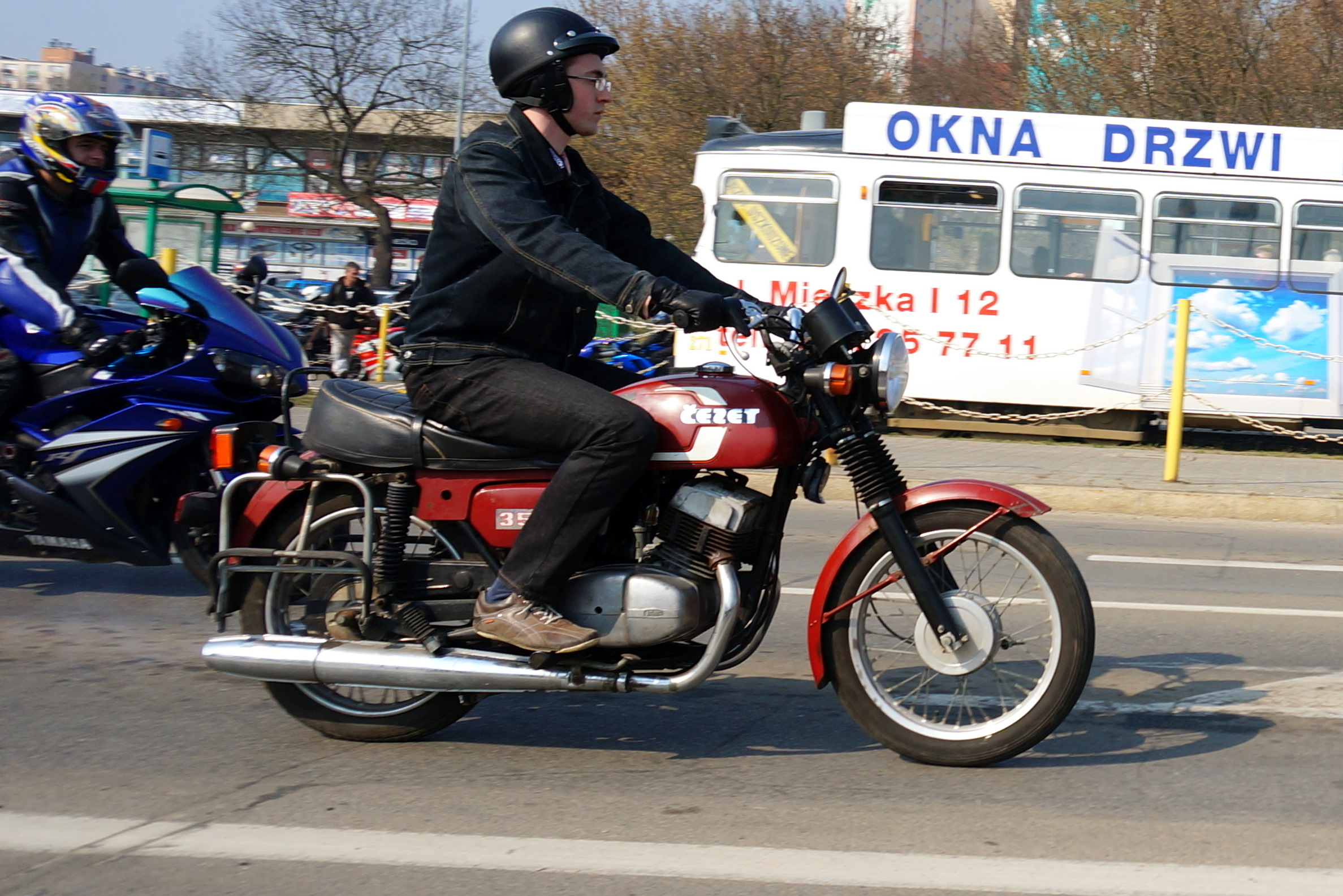 ČZ 350 typ 472, popularny w latach 80 XX w. motocykl produkowany w Czechosłowacji. Producentem była Česká Zbrojovka Strakonice przy współpracy Jawy, stąd często określa się ten motocykl Jawa Čezet.